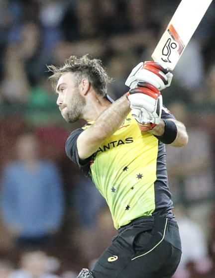 Glenn Maxwell batting during AUSvNZL T20